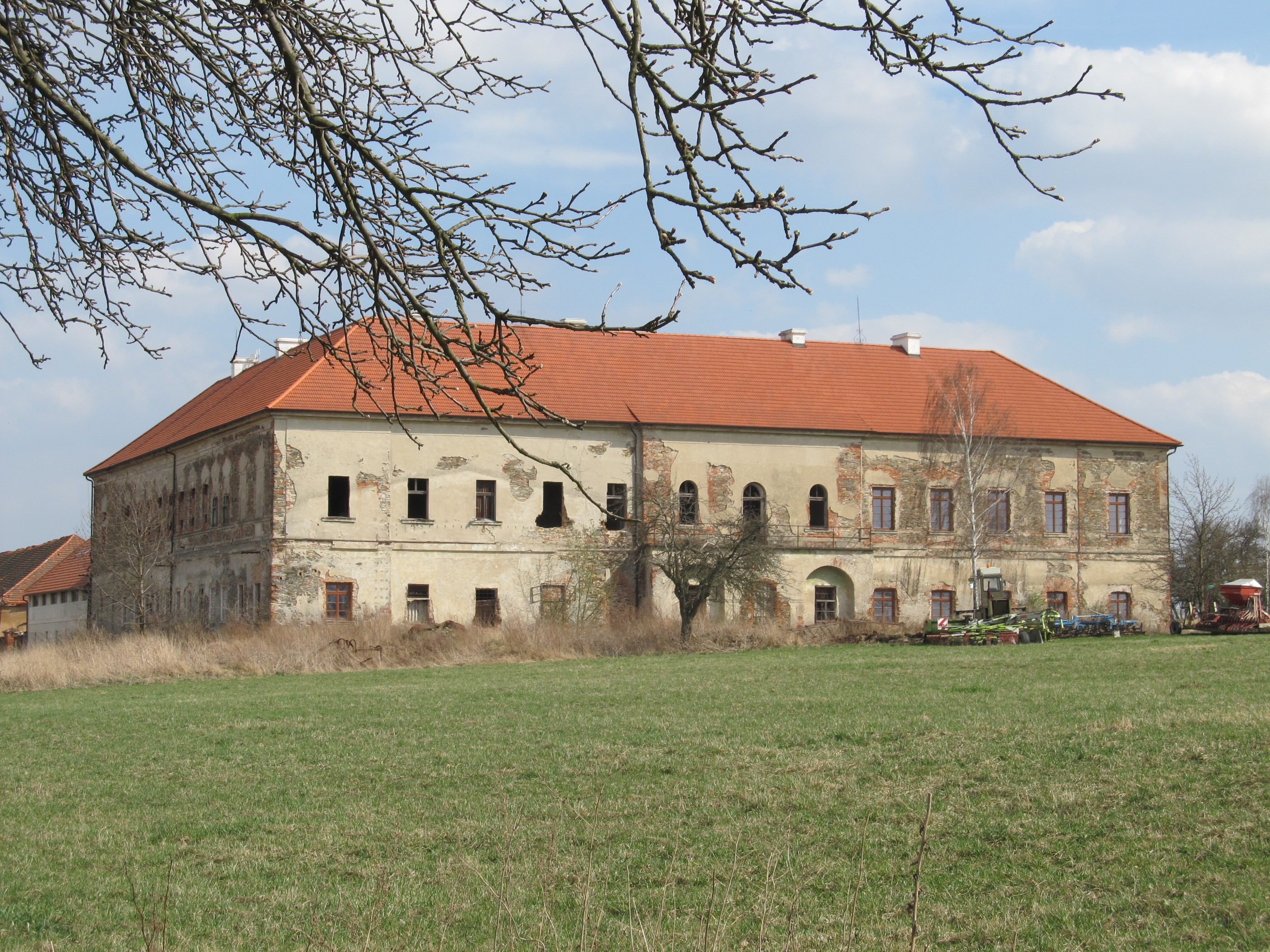 Svinná - zámek